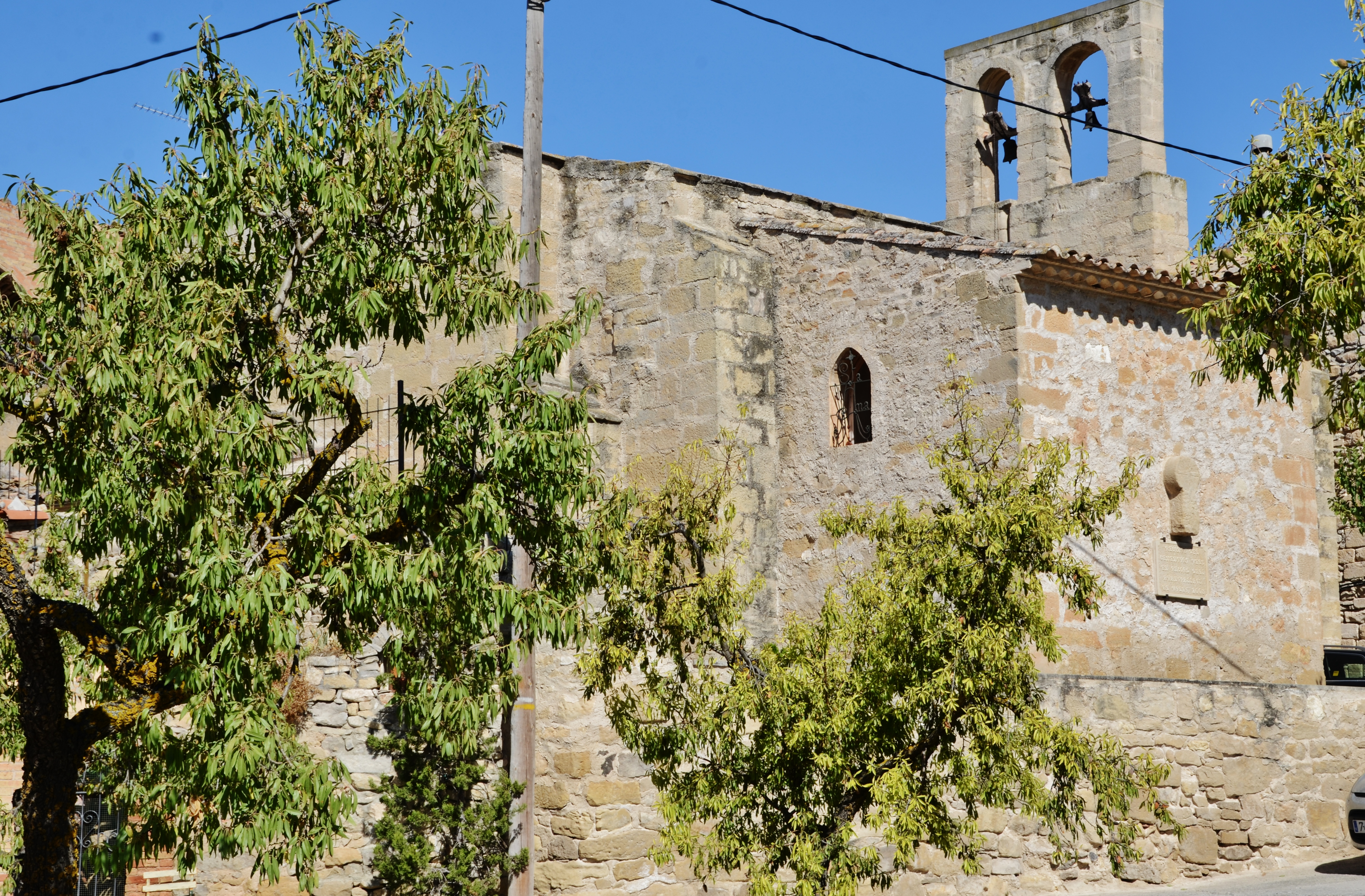 Església de Santa Maria del Vilet (Sant Martí de Riucorb)